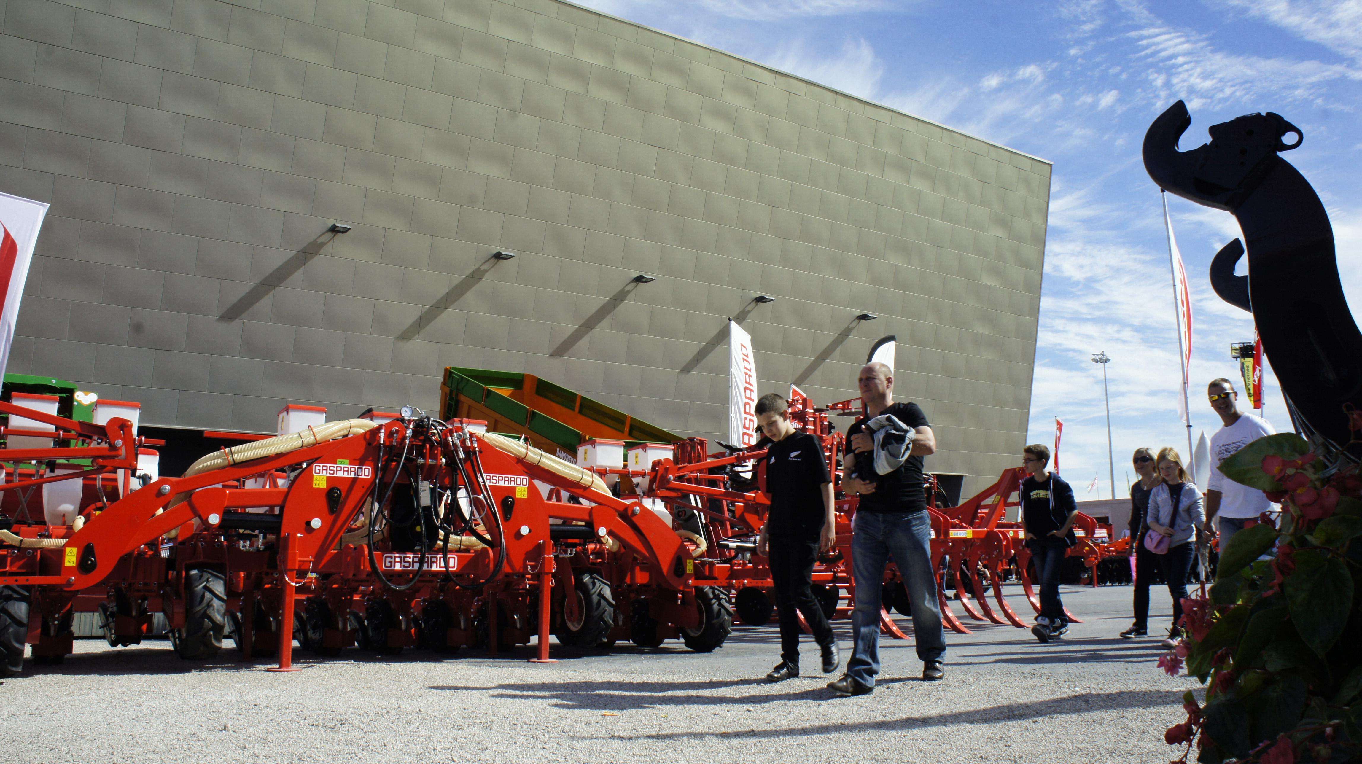 Nouvelle halle de la foire de Cha^lons de 2012.